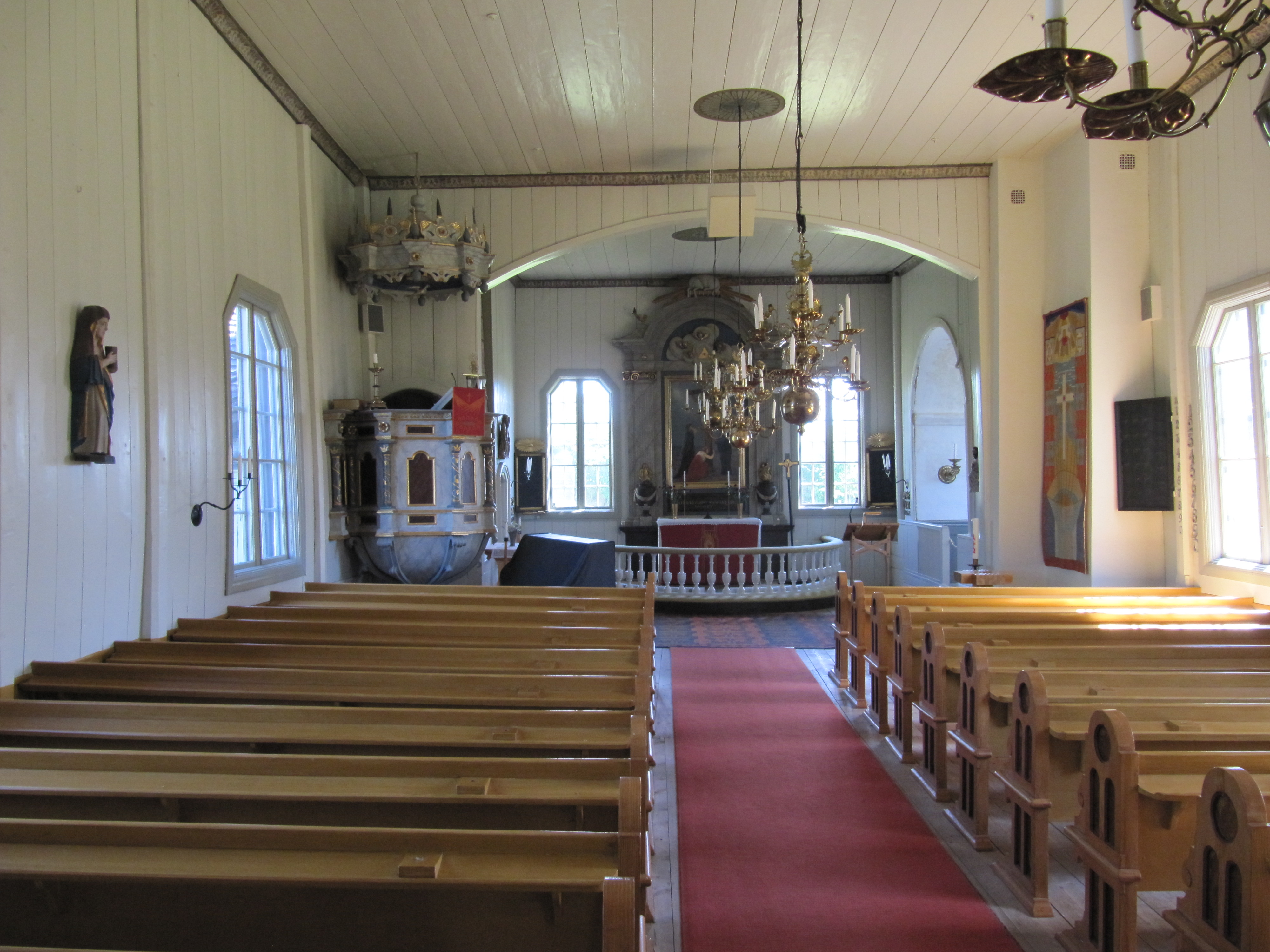 Kyrkorum i Pelarne kyrka